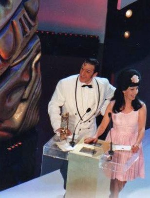 Shirley et Dino, humoristes français, à la cérémonie des Césars